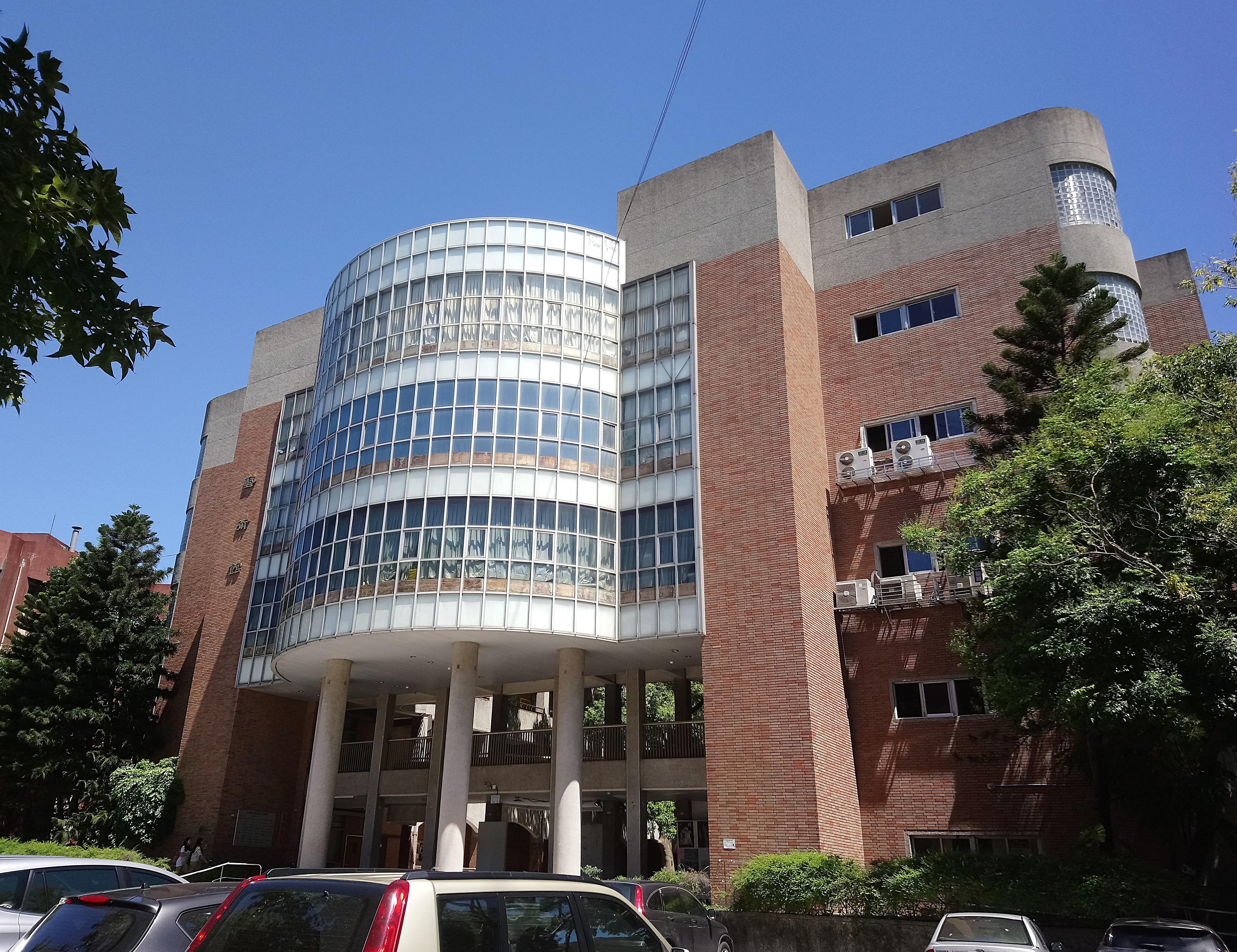 國立臺北教育大學藝術館,臺北市大安區大安區臥龍次分區臥龍里